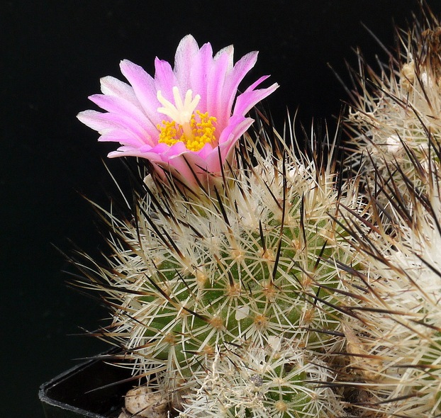 Turbinicarpus beguinii, Pablillo, N.L. in Blüte.